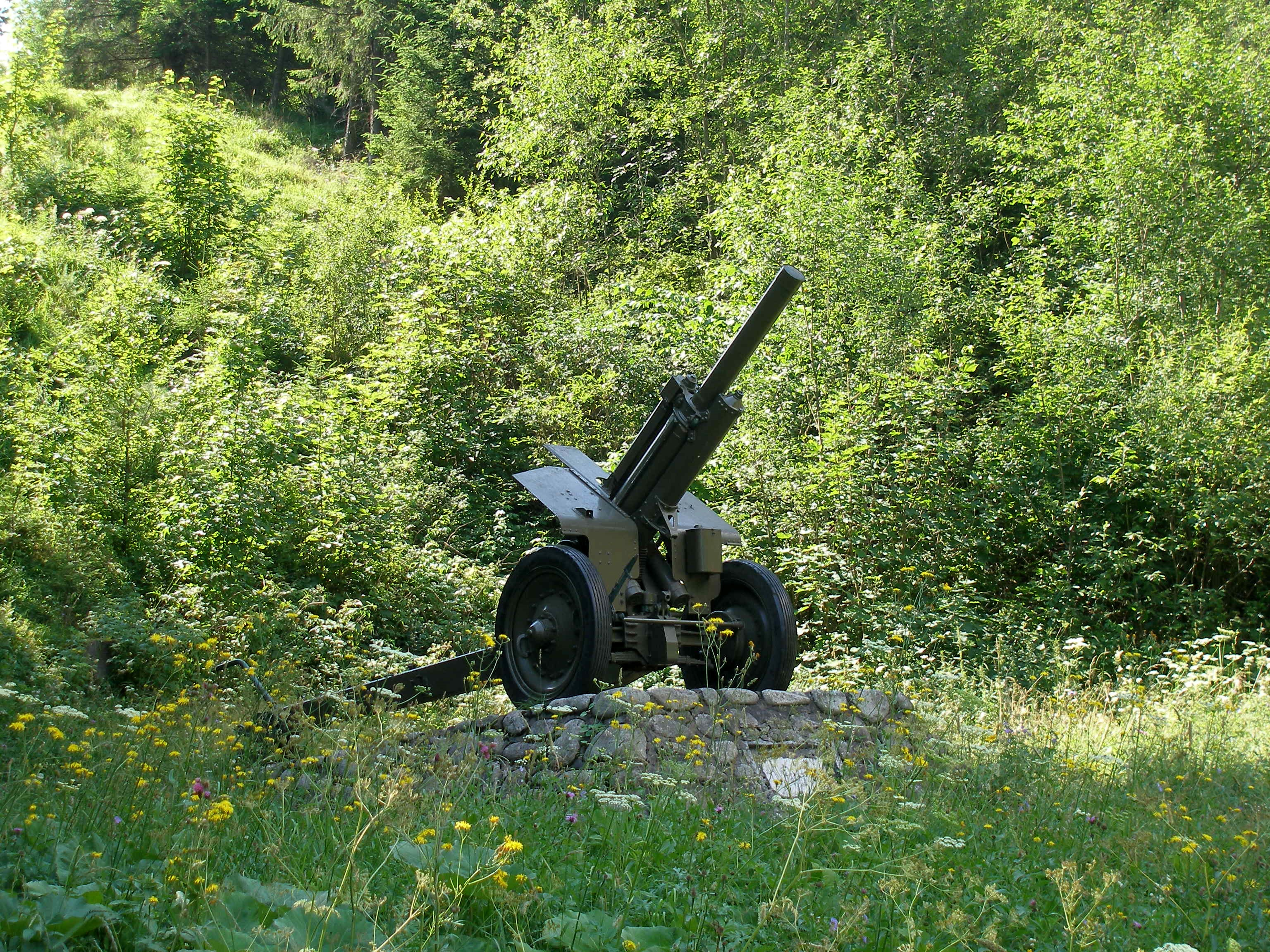 Obec Malužiná. Okres Liptovský Mikuláš.Vojenský pamätník na pamiatku delostrelcov bojujúcich v Slovenskom národnom povstaní v okolí Malužinej.Na podstavci je historické delo - 122 mm húfnica vz.38.